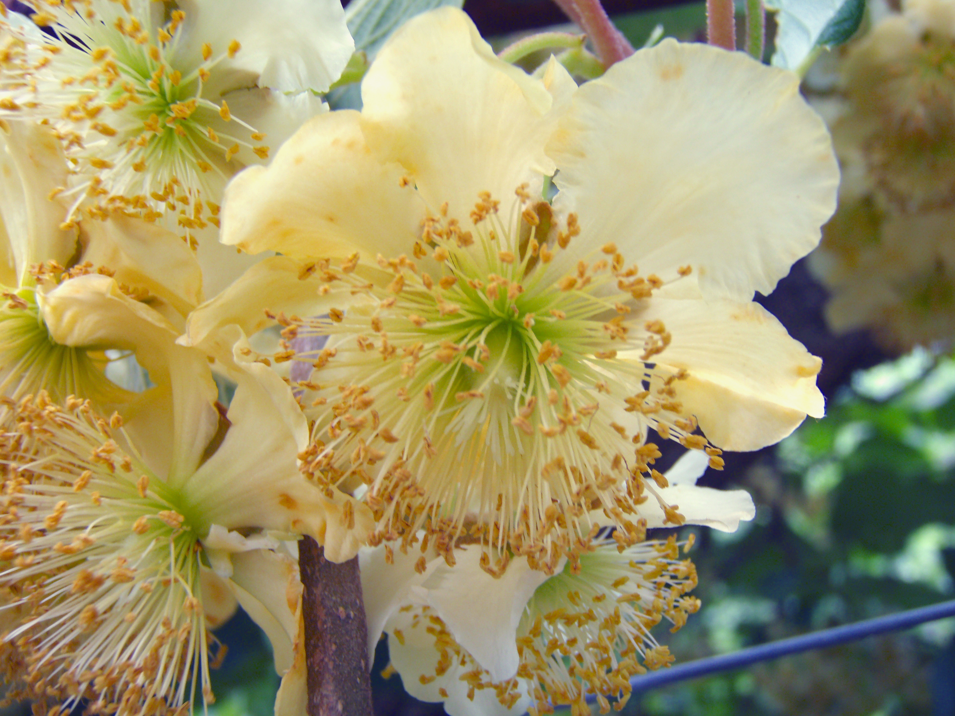 Description: Male Kiwi-flower, キウイフルーツの雄花(ヘイワード種)